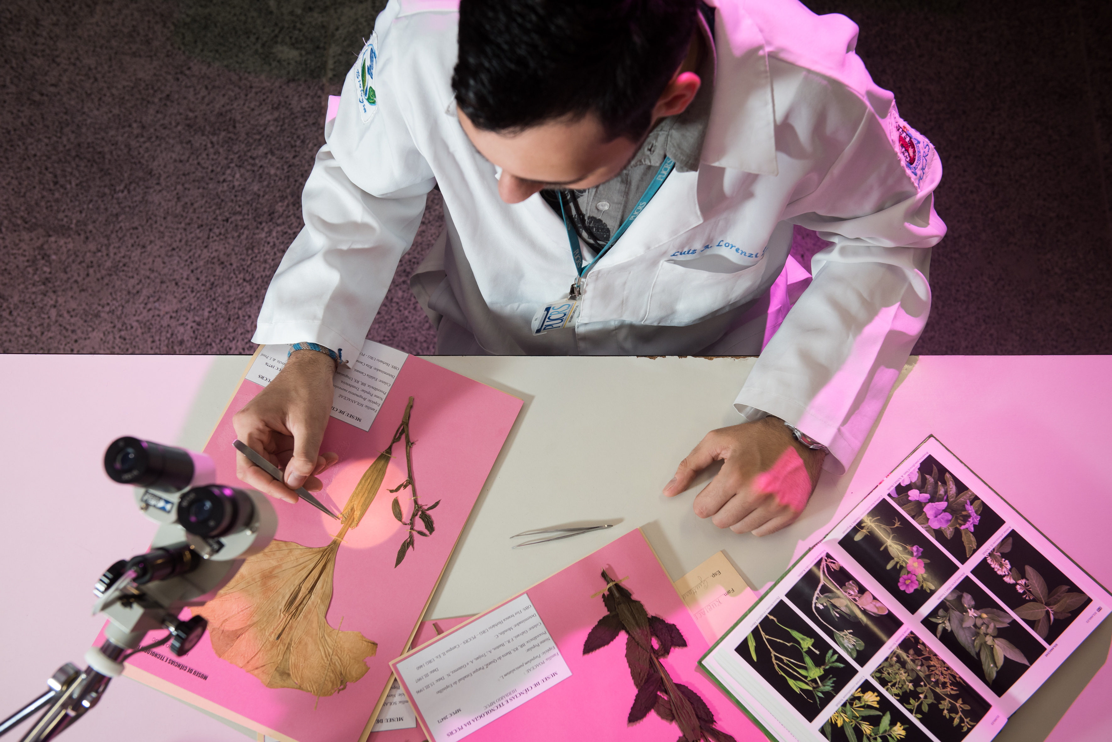 Pesquisa